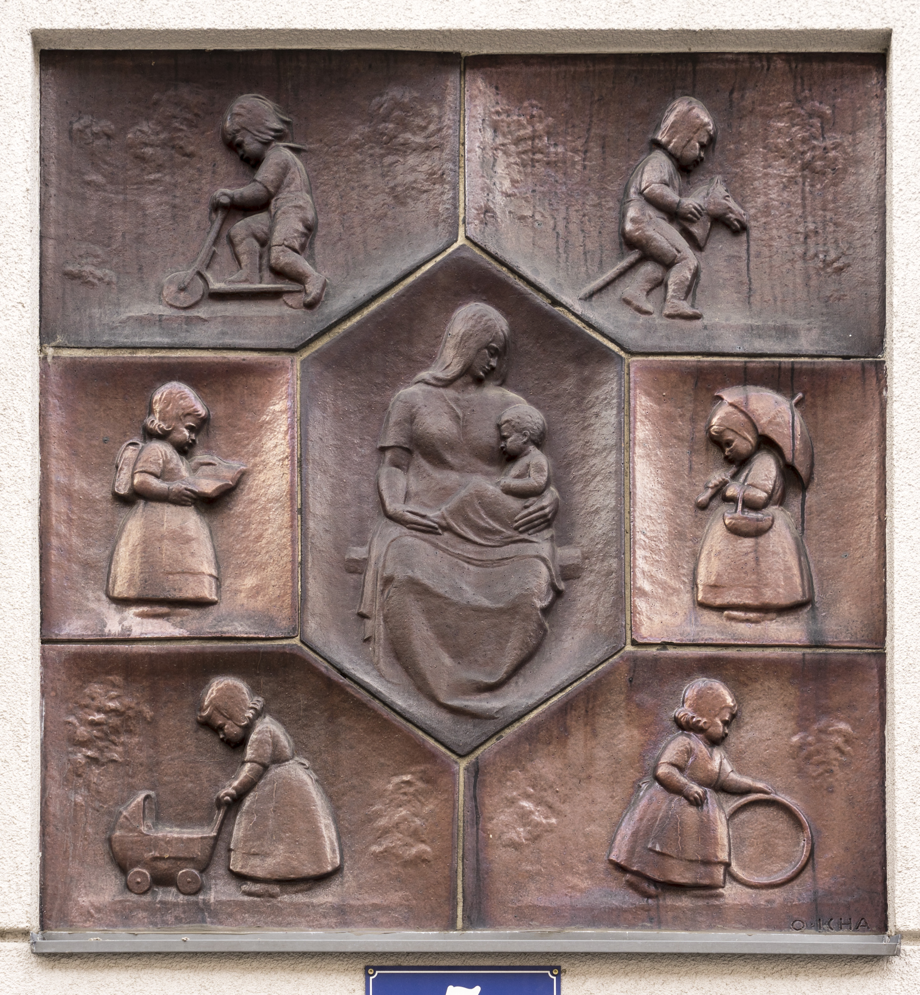 Wohnhausanlage Pfenningfeldgasse 3-7 Detail 1 This media shows the Vienna residential building (Gemeindebau) with the ID 1185. Object location48° 12′ 35.83″ N, 16° 18′ 59.48″ E